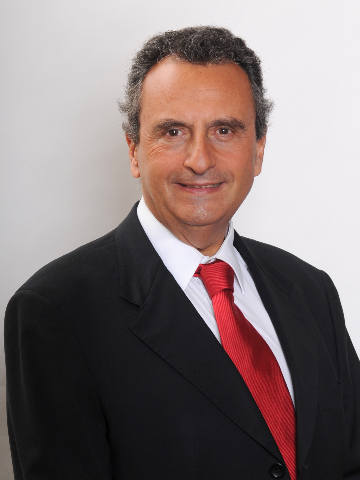 Patricio Alejandro Hales Dib